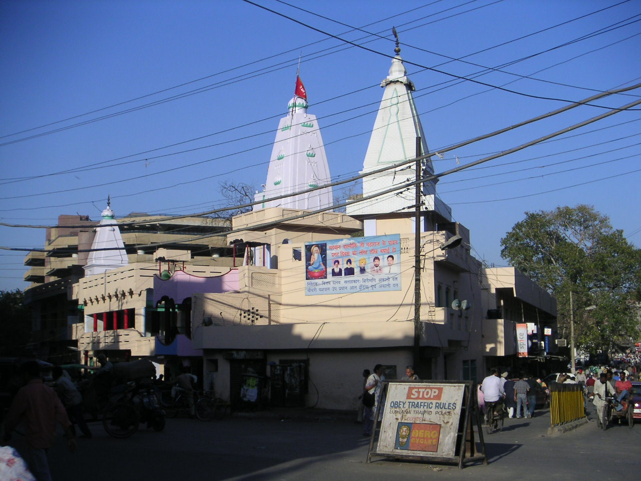 Ludhiana, Punjab, India. Photo: Soman